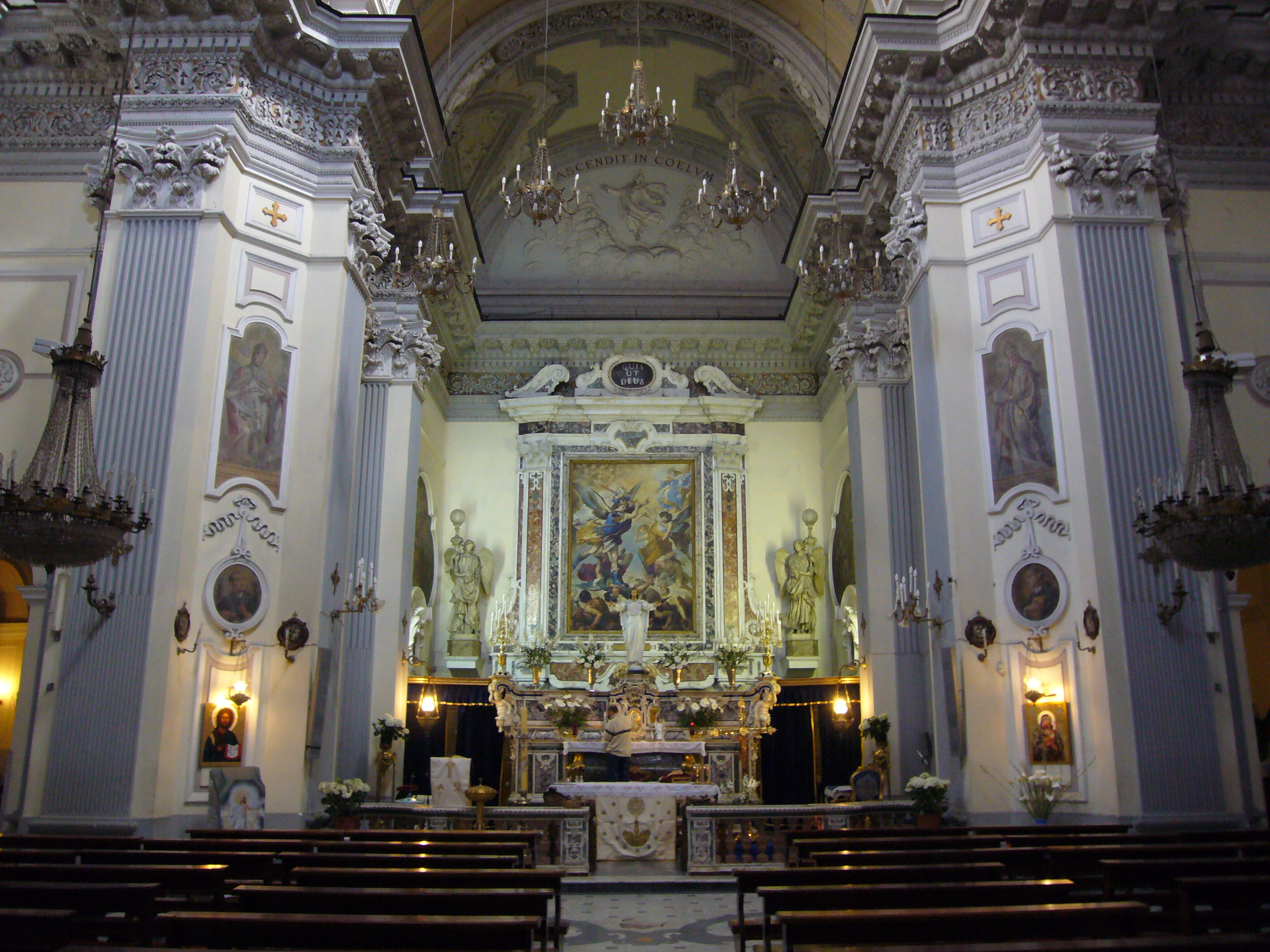 Napoli, chiesa dell'Ascensione a Chiaia: altar maggiore